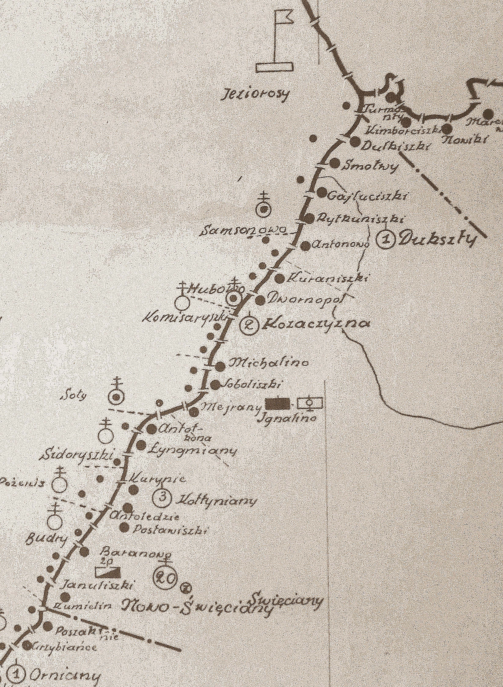 Szkic rozmieszczenia batalionu KOP Nowe Świeciany w 1931